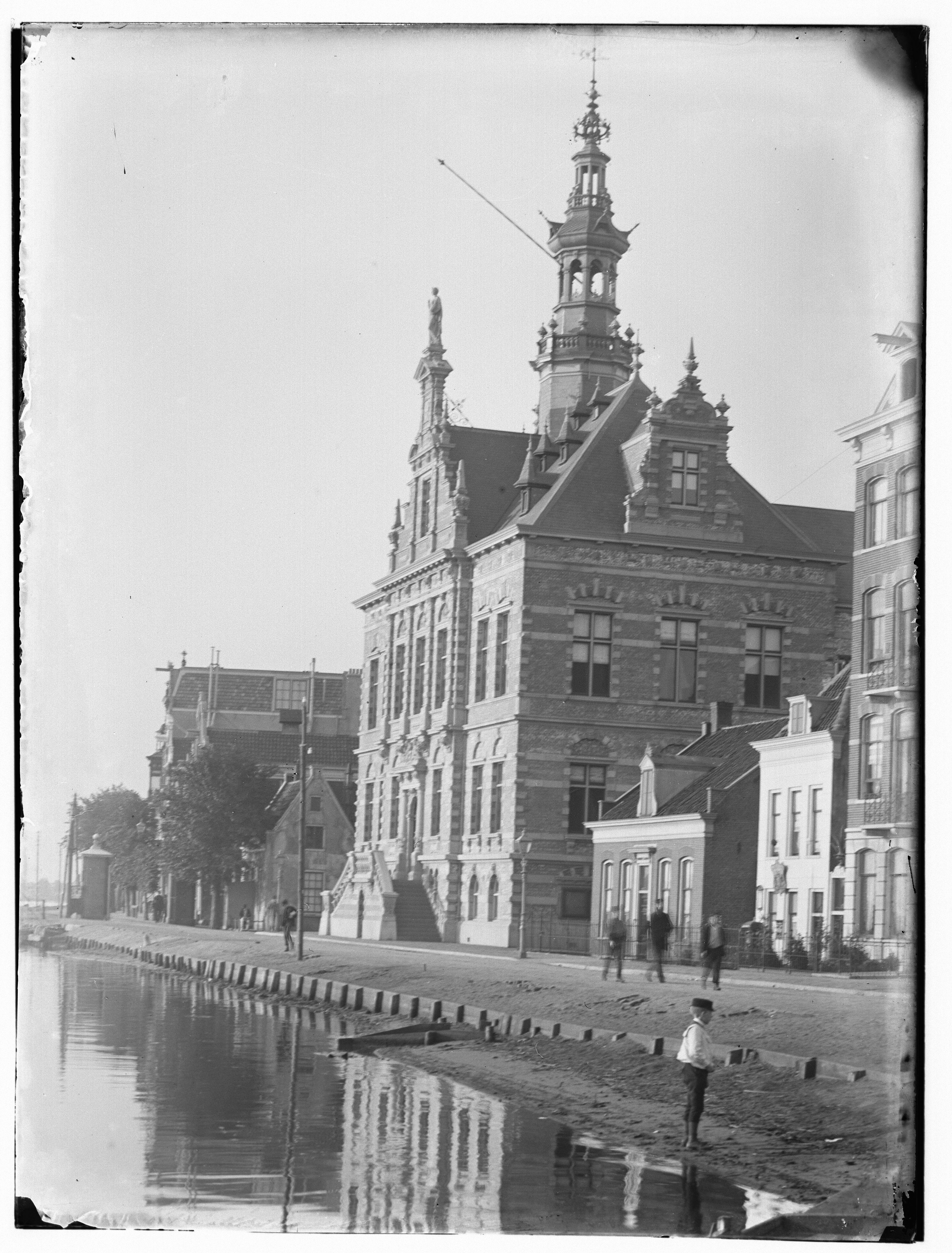 Beschrijving Amsteldijk 64-67 enz. (v.r.n.l.) Links hetTolhek bij de Tolstraat en op de hoek het Gemeentehuis van Nieuwer-Amstel (van 1914 tot 2007 Gemeentearchief Amsterdam)``, Amsteldijk 67. Documenttype foto Vervaardiger Olie``, Jacob (1834-1905) Collectie Collectie Jacob Olie Jbz. Datering 1892 Geografische naam Amsteldijk Inventarissen Afbeeldingsbestand 010019000030 Generated with Dememorixer